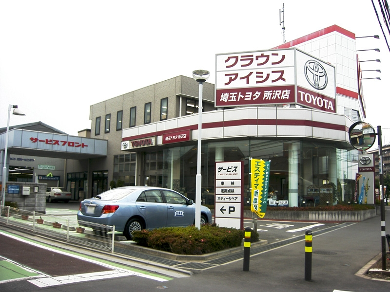 “Toyota_Saitama_Car_dealership_Tokorozawa”